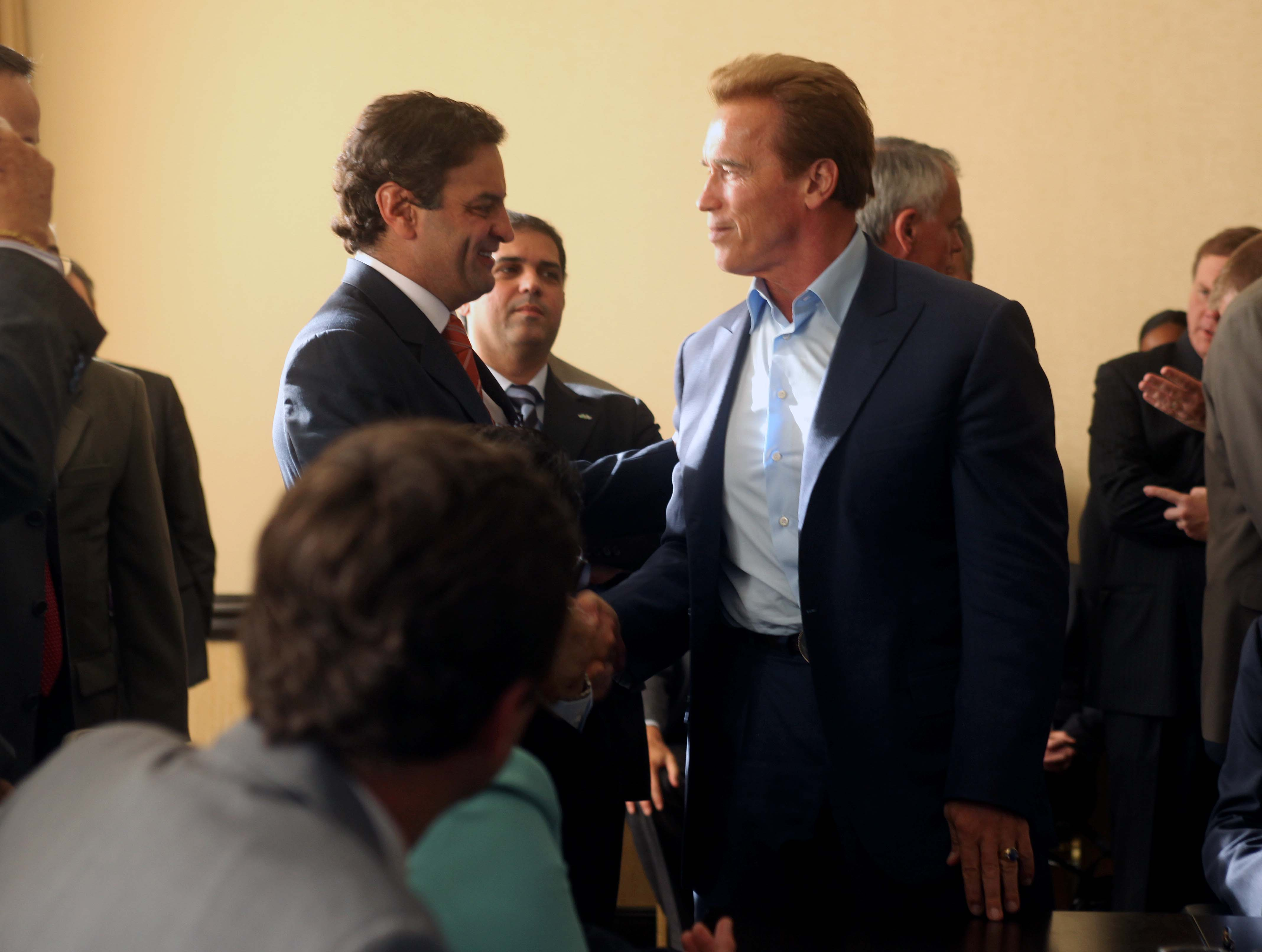 Aécio Neves (MG) e Arnold Schwarzenegger (Califórnia) se encontram na Segunda Cúpula de Governadores sobre o Clima Global. Dia 01/10/09, em Los Angeles (EUA). Foto: Marcelo Capuchinho.